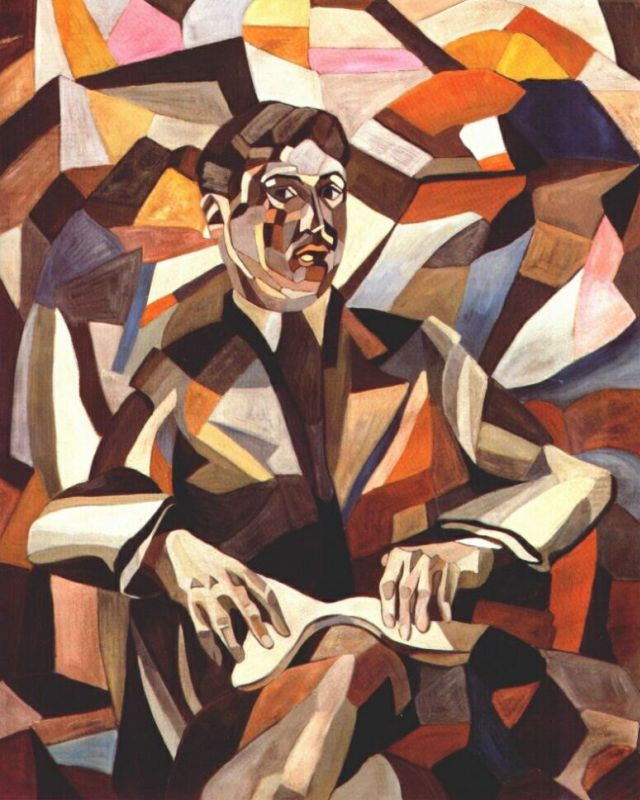 Автопортрет